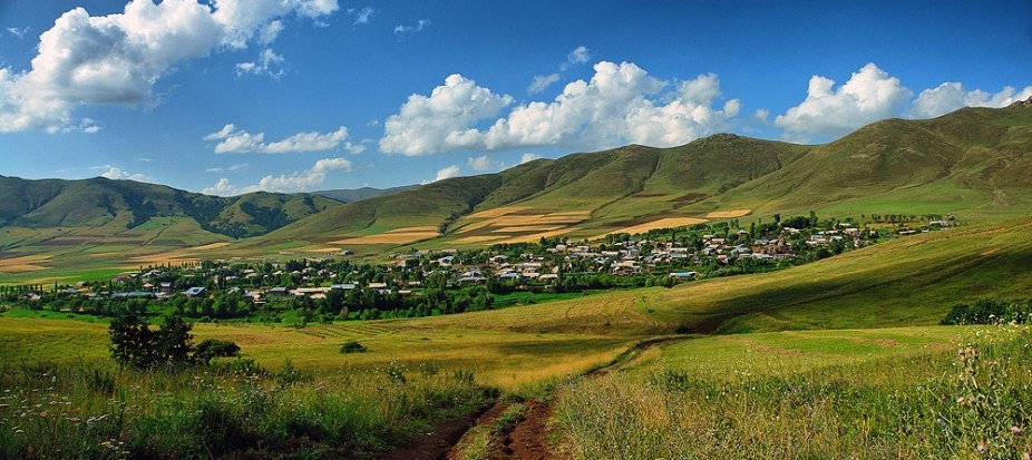 село Египатруш